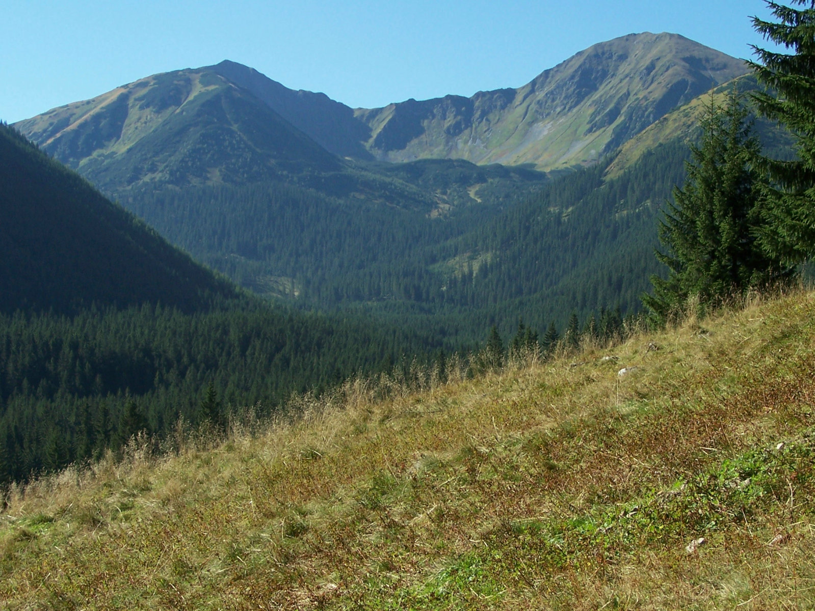 Wyżnia Dolina Chochołowska. U góry szczyty Łopaty, Jarząbczego Wierchu